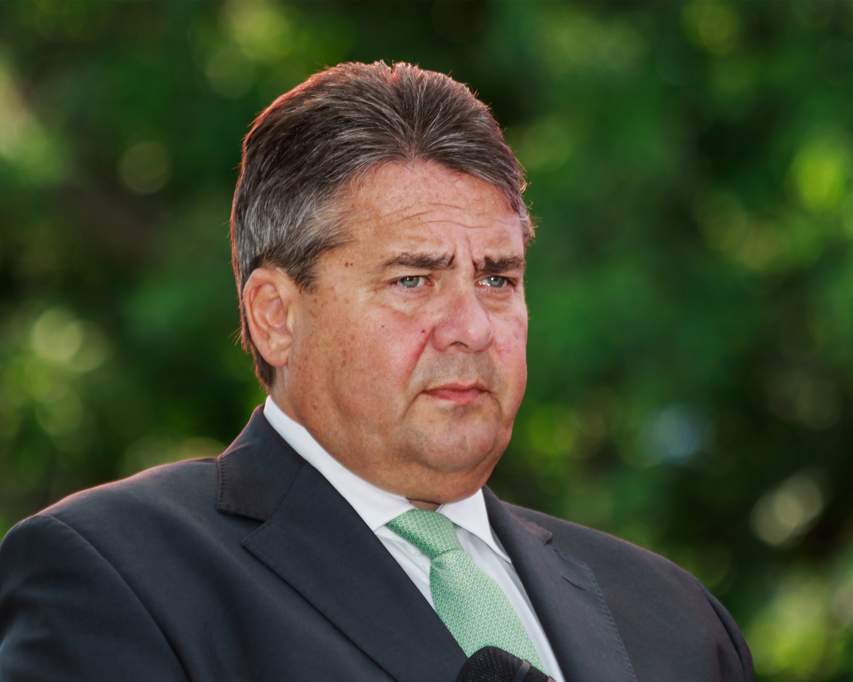 Tag der Offenen Tür Berlin 2015: Sigmar Gabriel